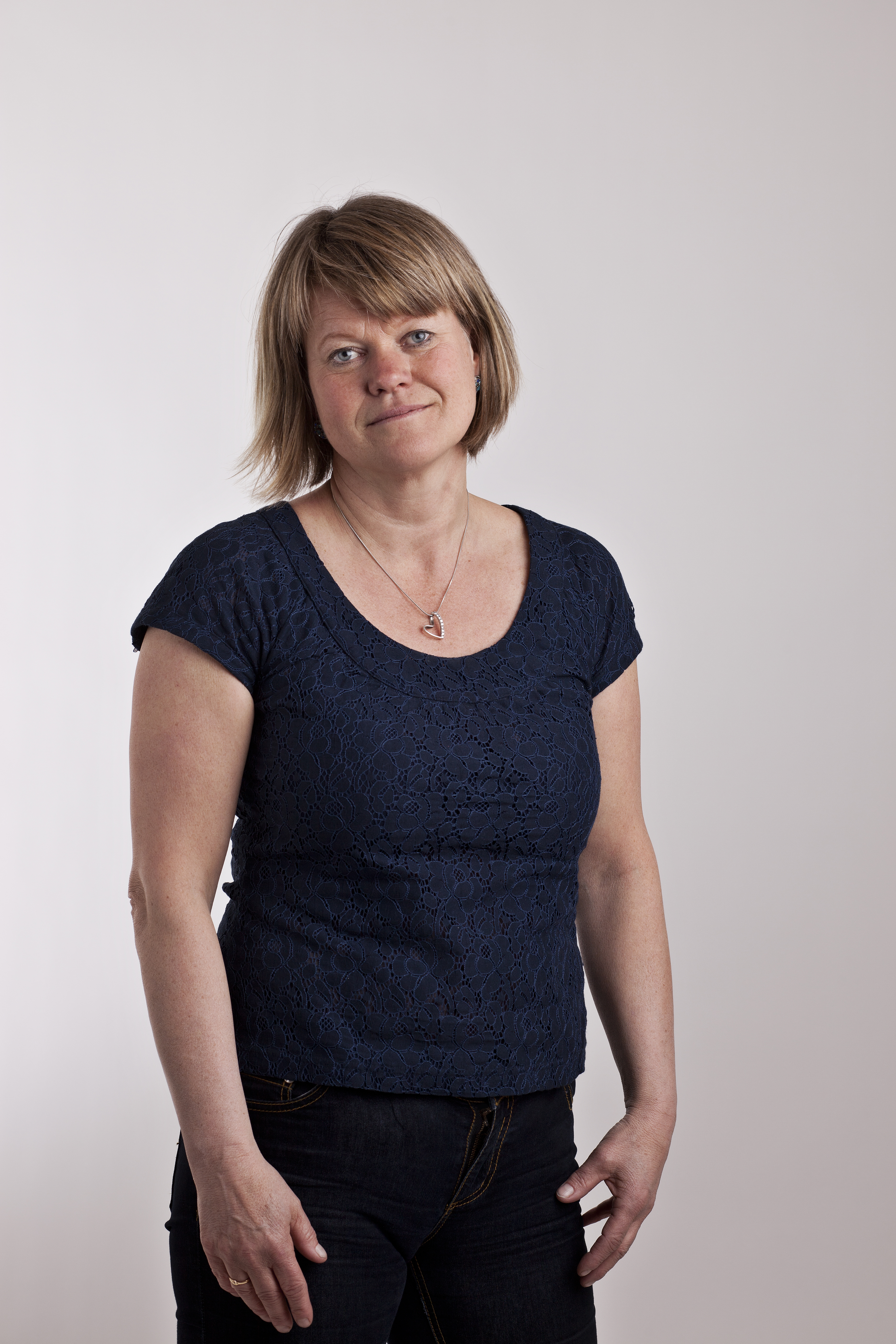 Ulla Andersson, Vänsterpartiet.